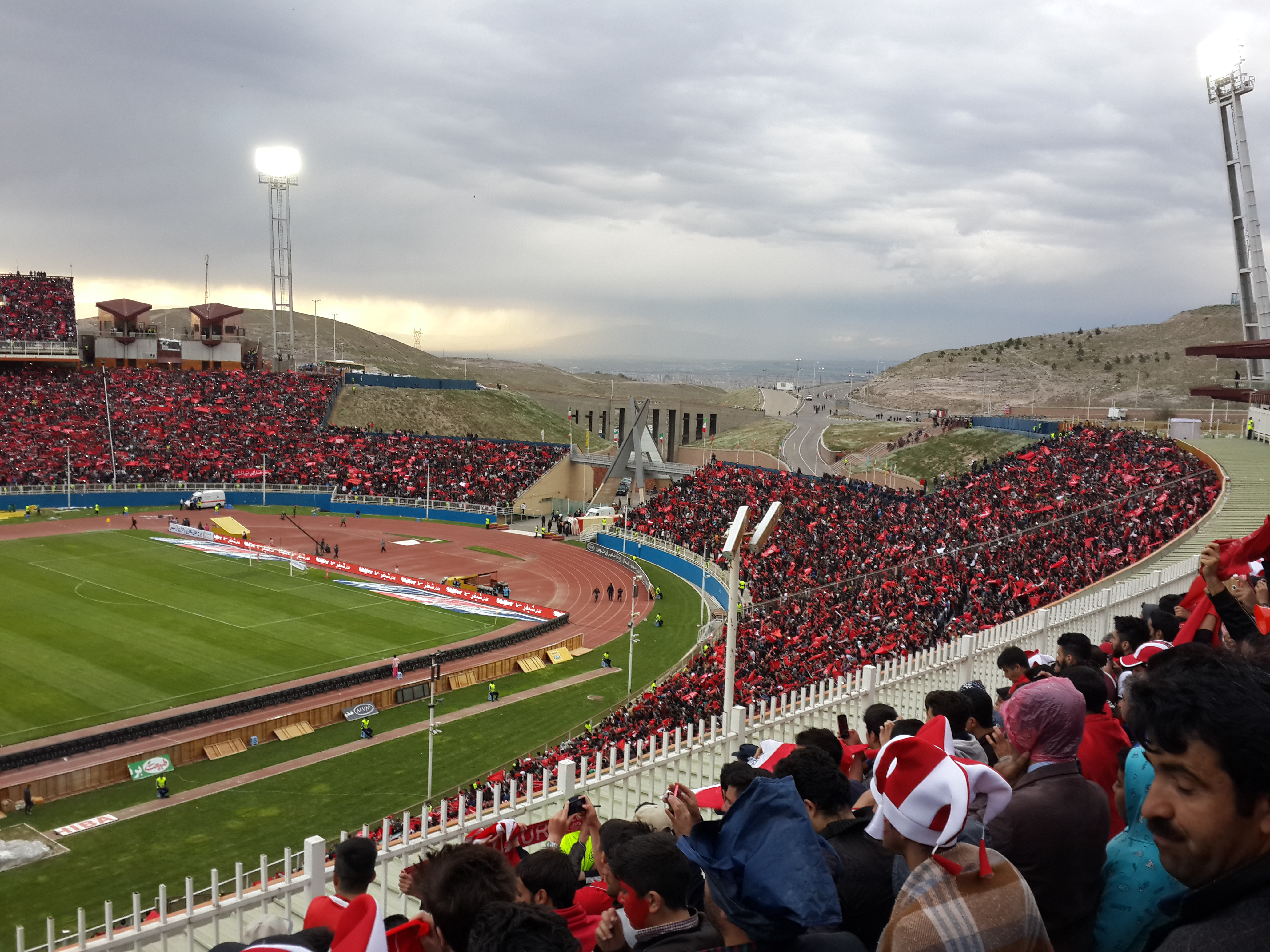 ورزشگاه یادگار امام در بازی تراکتور و نفت - اردیبهشت 94